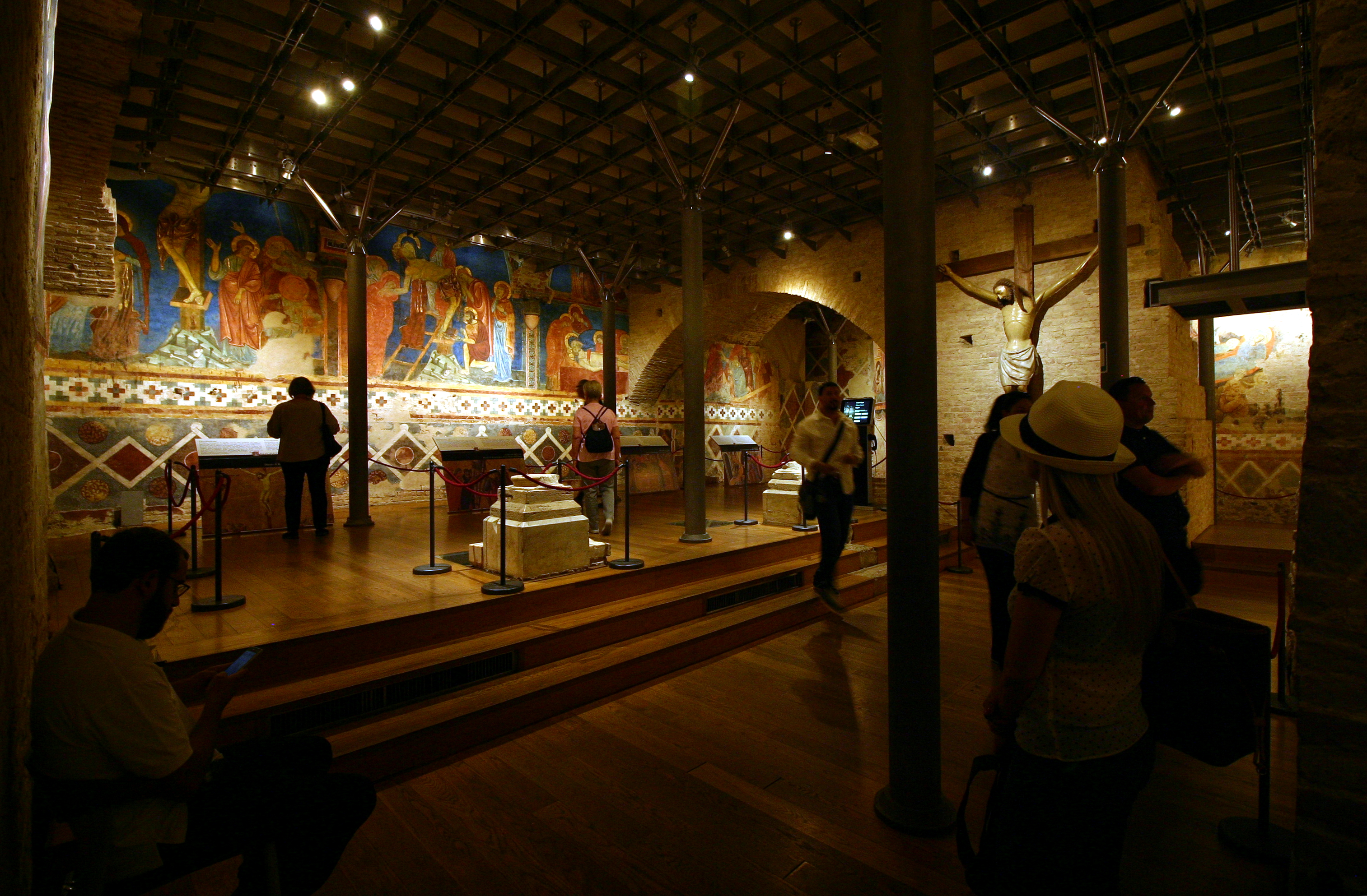 Duomo - Siena